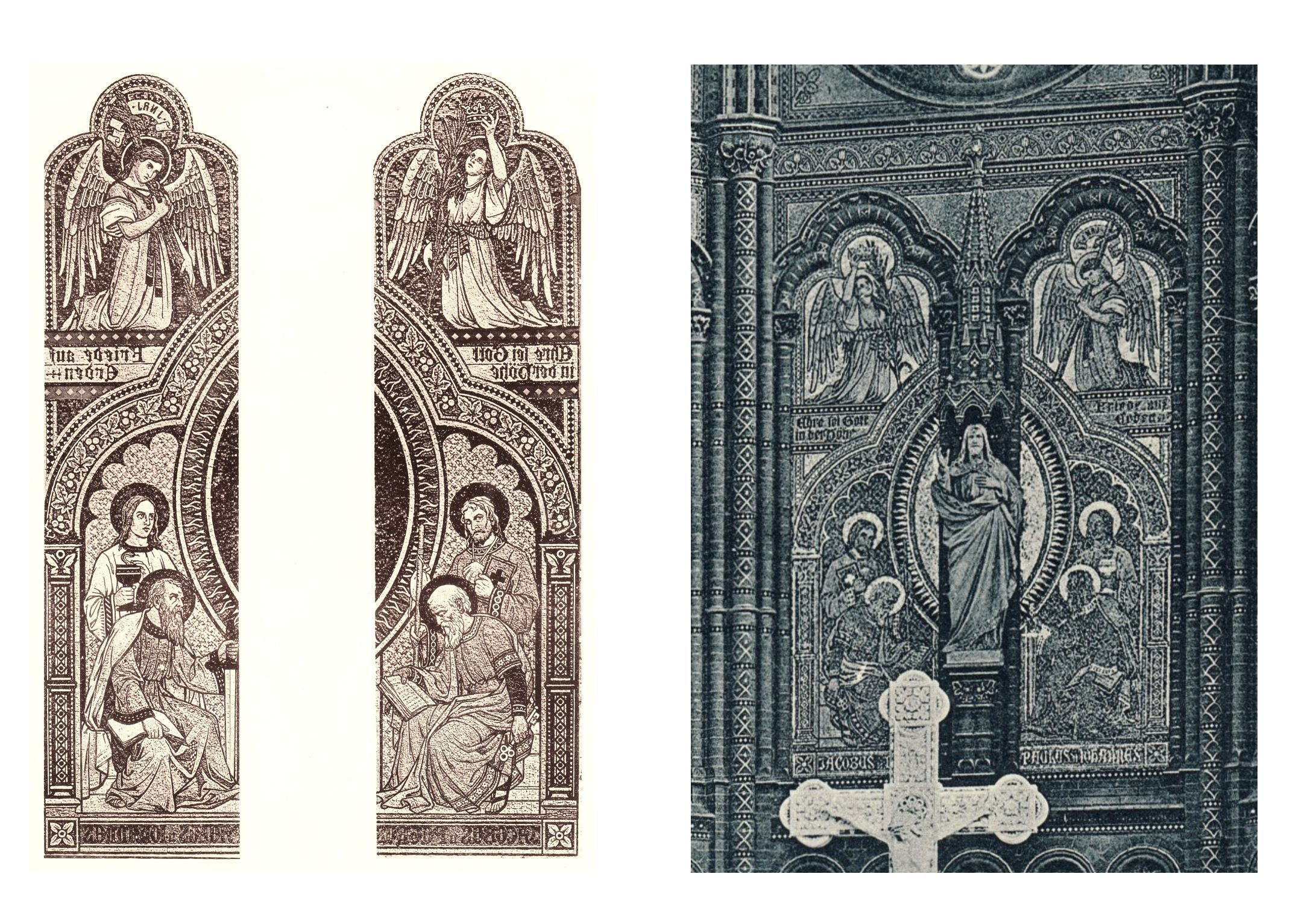 Berlin - Georgenkirche, Altarmosaiken: links vor der Anbringung, rechts nach der Anbringung